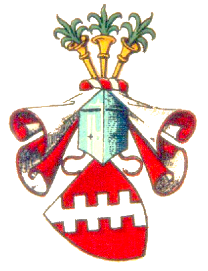 Wappen derer von Schorlemer